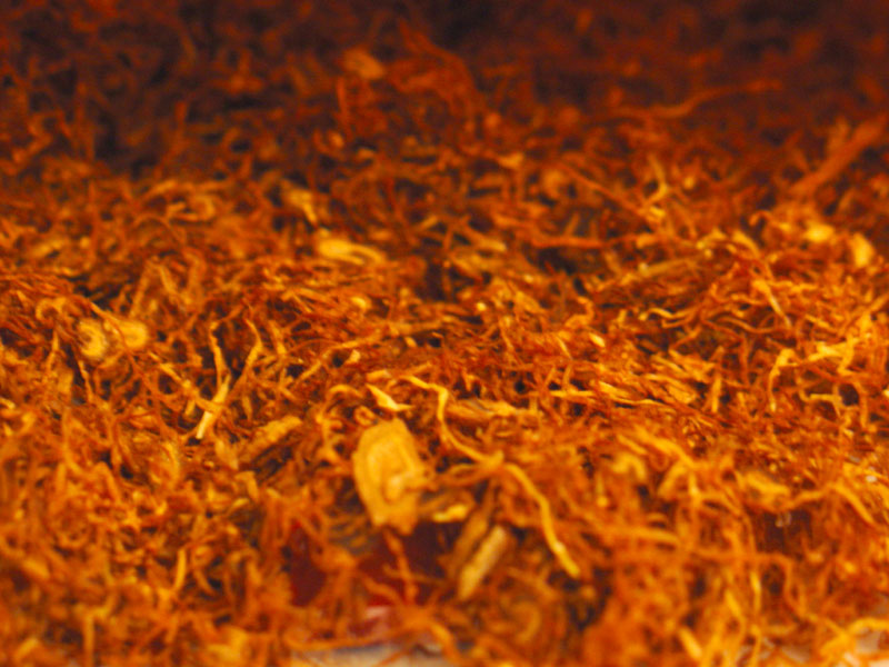 Tabac séché à l'air chaud type Virginie.